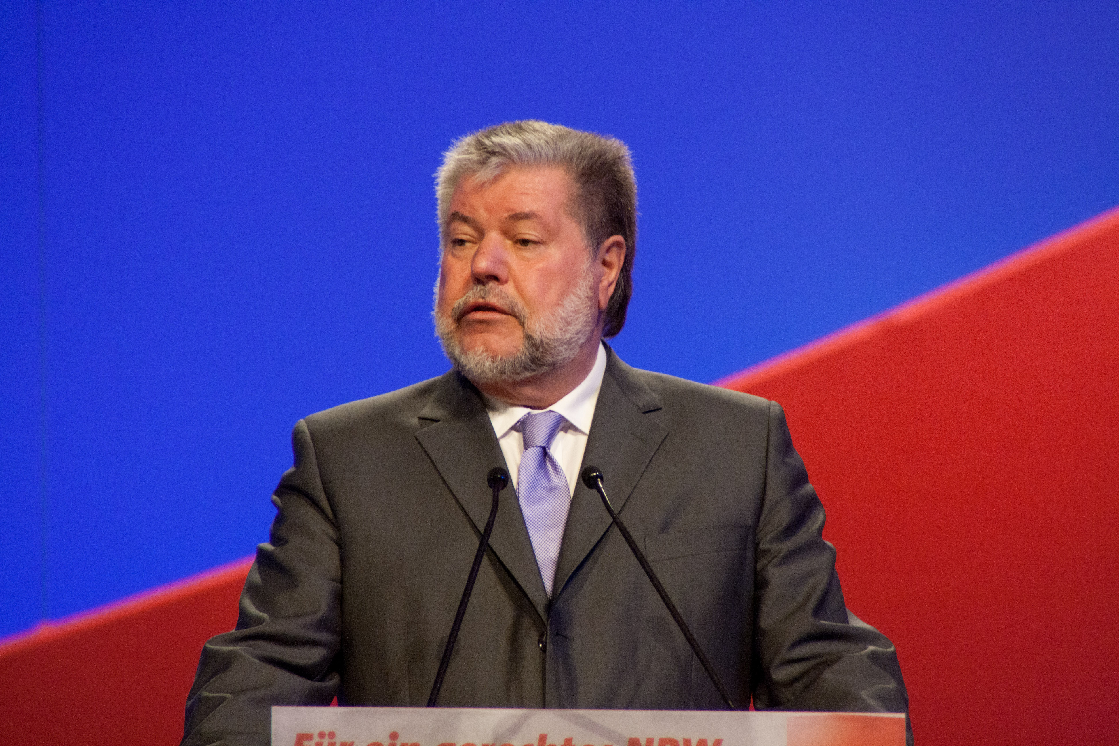 Kurt Beck, SPD, Düsseldorf, Philipshalle